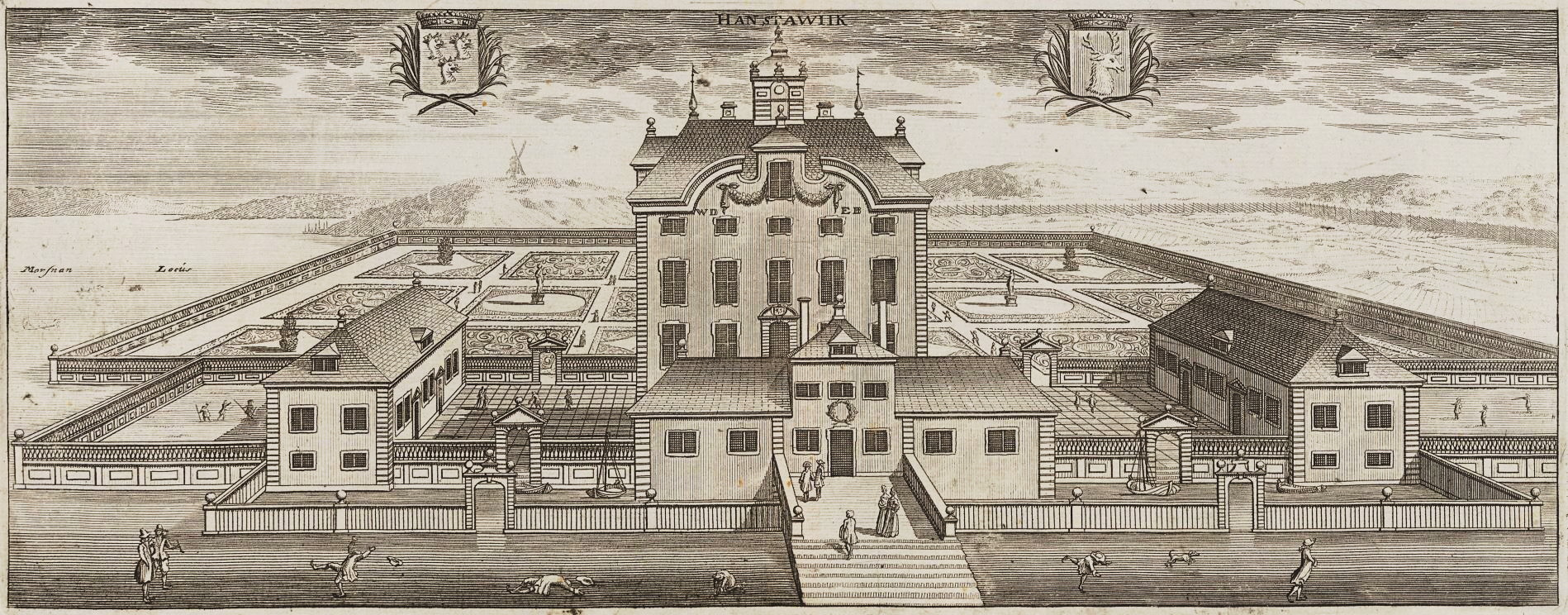 Hanstawiik eller Hanstavik